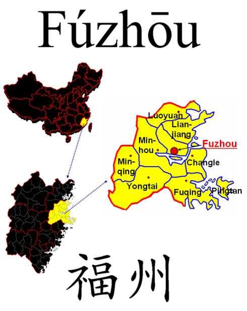 Kreise des Bezirks Fuzhou Beschreibung: Kreise des Bezirks Fuzhou Quelle: selbst erstellt am 16. 11. 2004 Fotograf / Zeichner: --Immanuel Giel 10:52, 16. Nov 2004 (CET) Andere Versionen: JPG (für die GNU FDL) (für Public Domain)